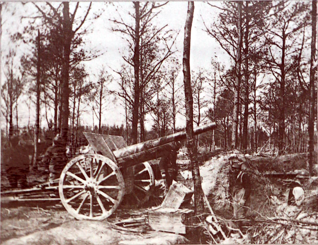 pendant la battaile des monts de champagne.